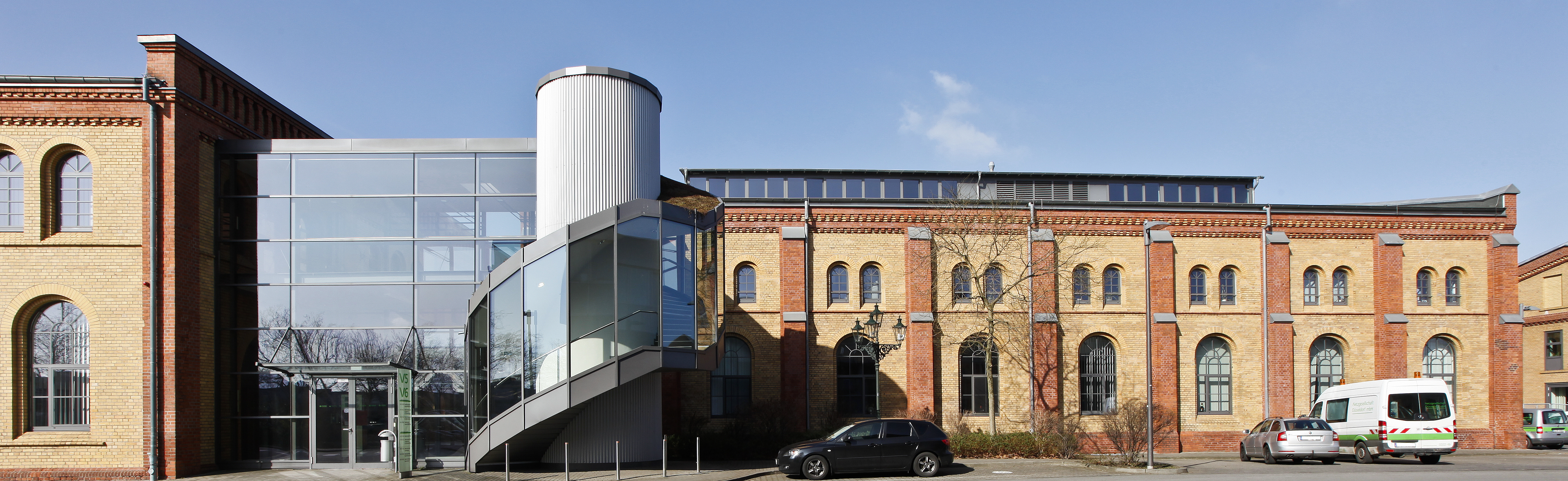 Standort Netzgesellschaft Düsseldorf mbH, Höherweg 200 - Düsseldorf